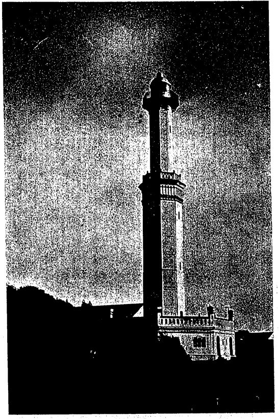 Faro de Punta Nador, en Larache, Marruecos.